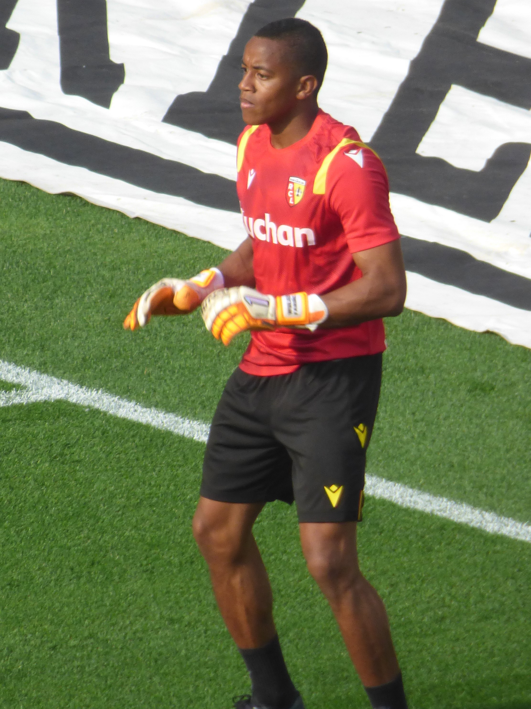 Wuilker Farinez lors du match amical RC Lens / Dijon FCO, le 15 août 2020, au Stade Bollaert-Delelis de Lens.